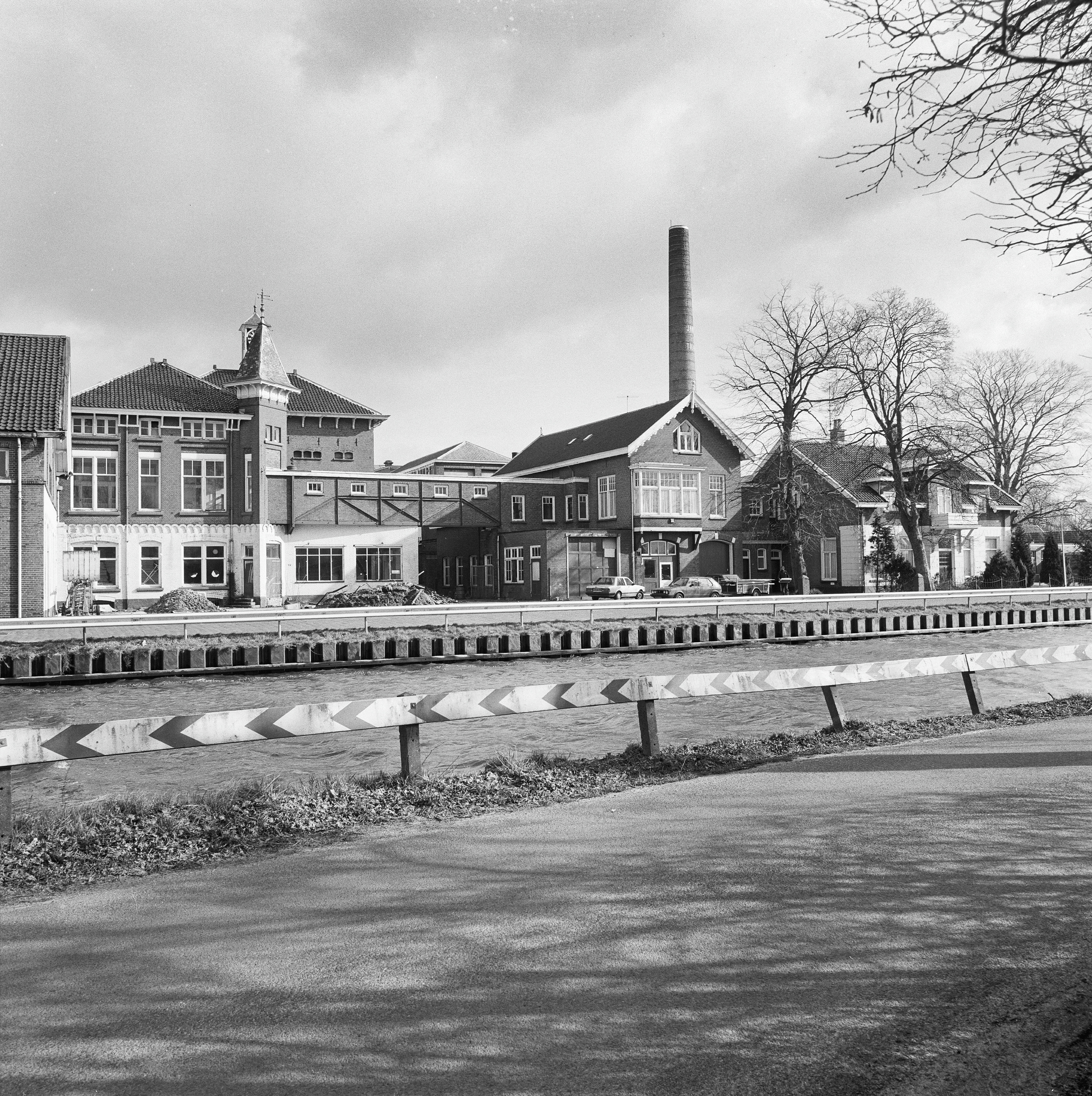 FABRIEKSCOMPLEX JANSEN & TILANUS: Exterieur OVERZICHT